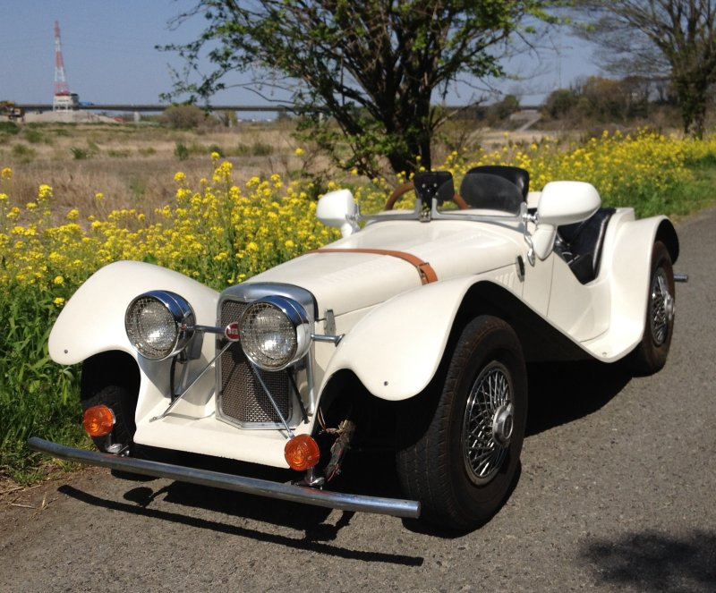 ミニカー 光岡自動車 BUBU505-C